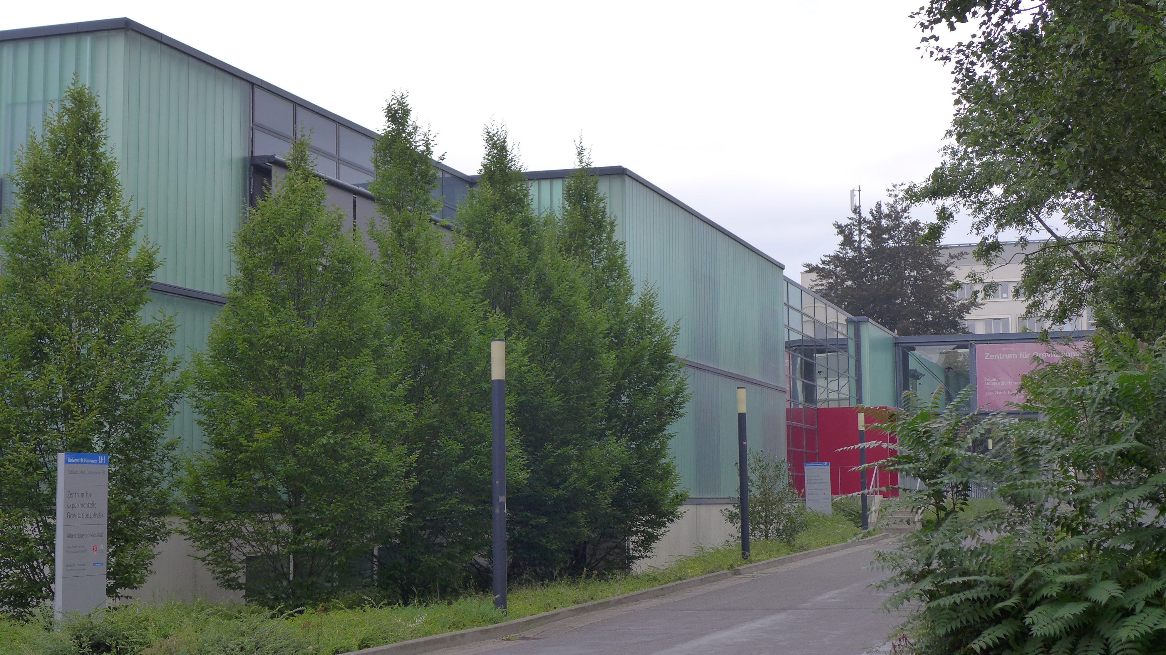 Albert-Einstein-Institut Hannover